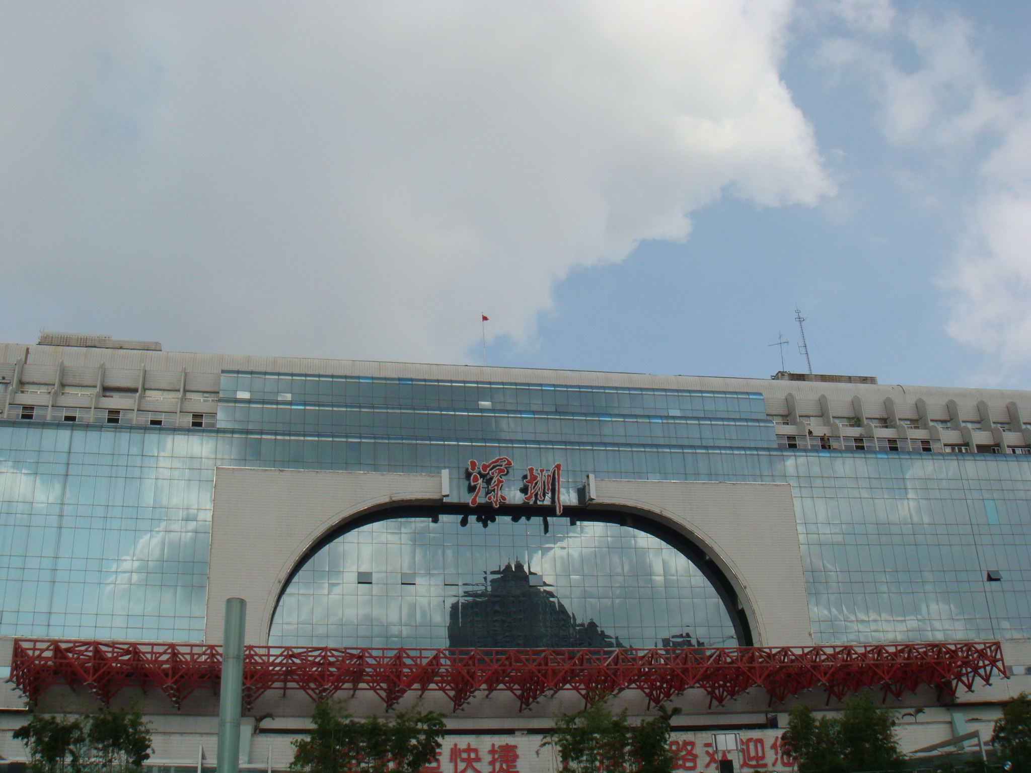 深圳站